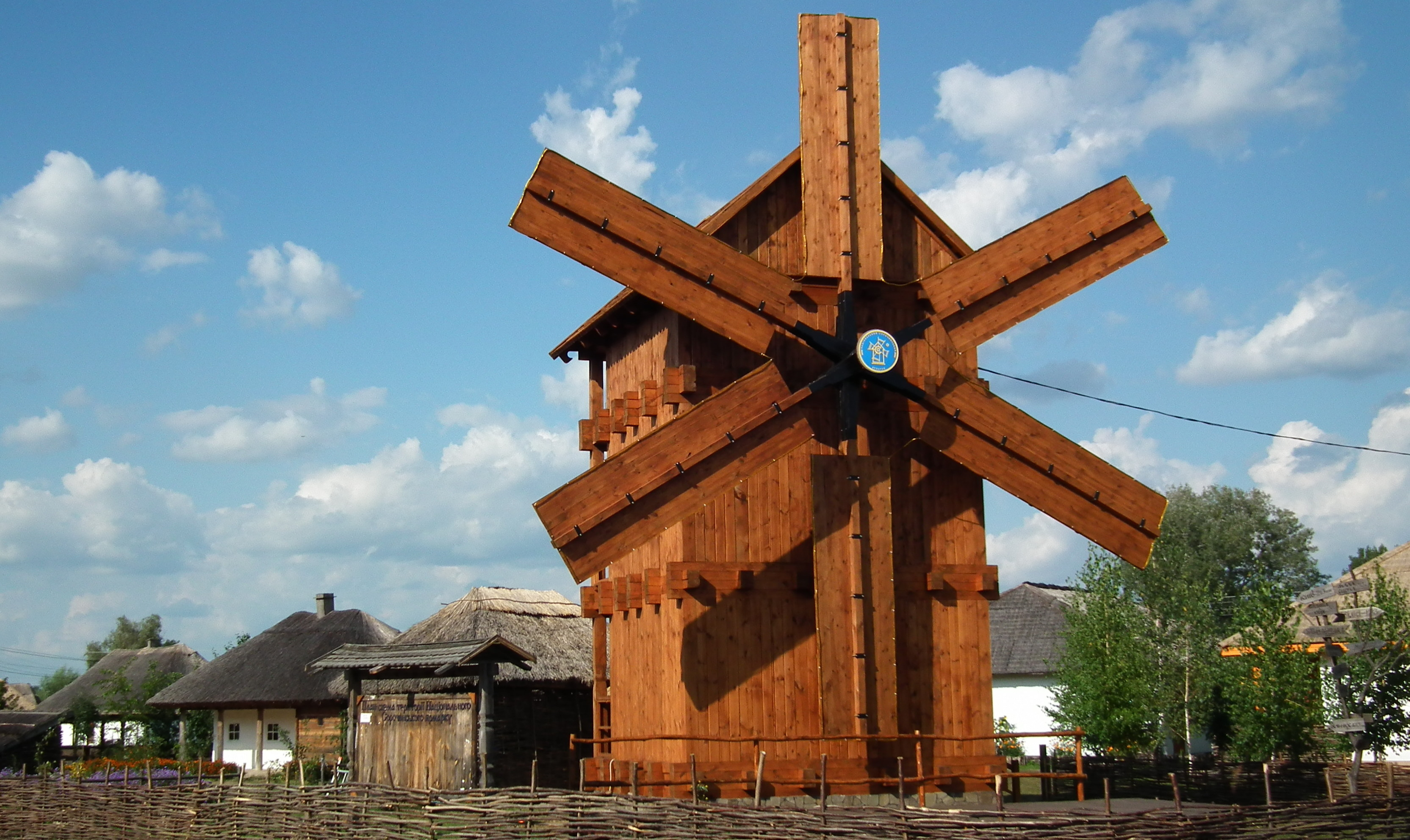 млин на Сорочинском ярмарке